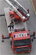 Autoladder van de brandweer Groningen - eigen foto, GFDL.